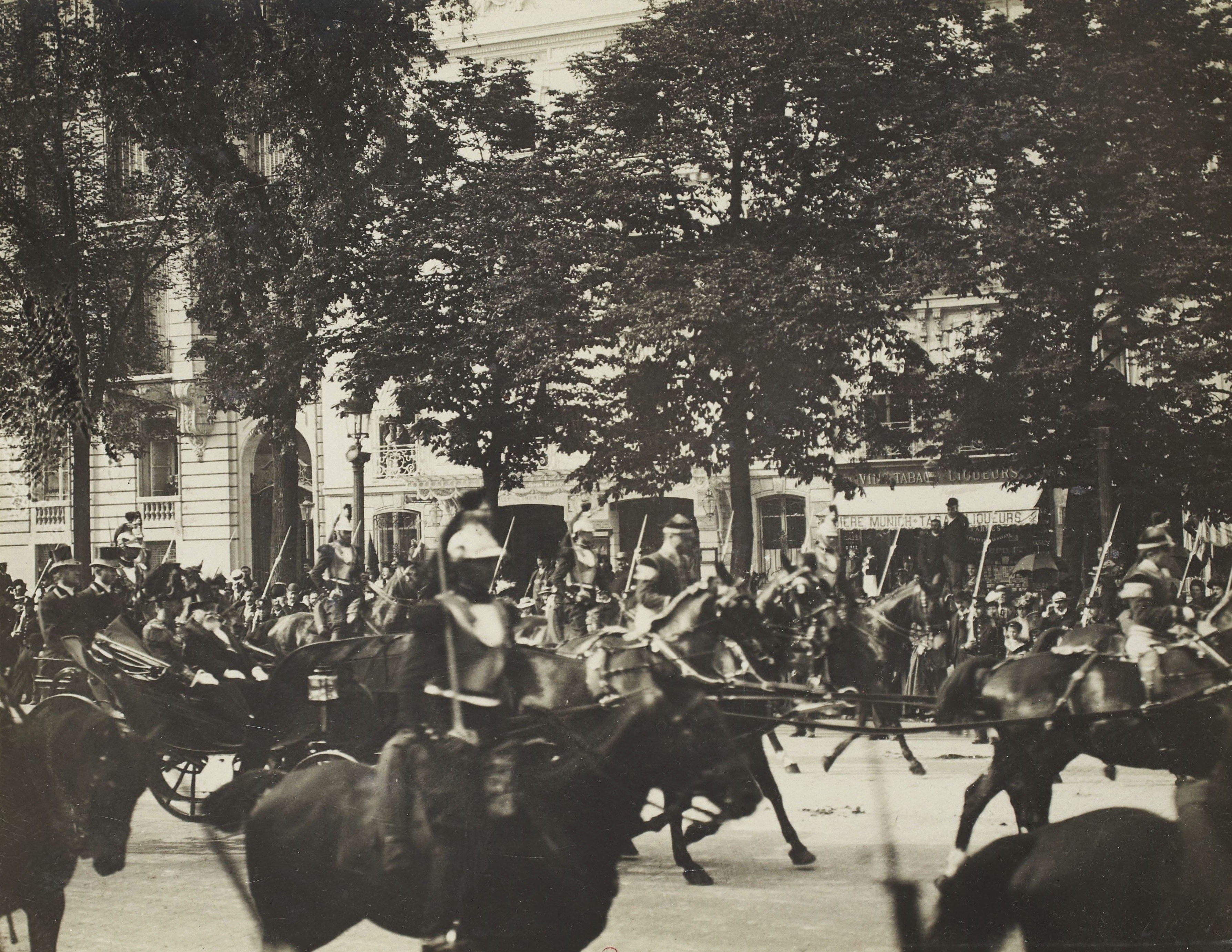 [Collection Jules Beau. Photographie sportive] : T. 33. Années 1906 et 1907 / Jules Beau : F. 49. [Sans titre. Visite des souverains norvégiens en France. Juin 1907]